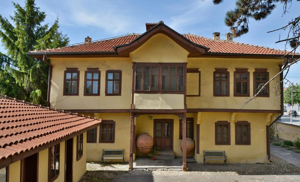 Srpski (latinica): Gradska kuća.